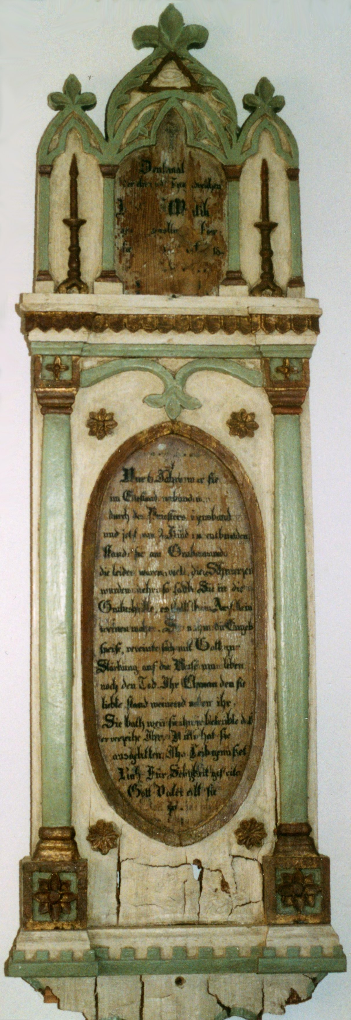 restauriertes Totenbrett, ca. 1850, Wenigmünchen, Kreis Fürstenfeldbruck, Oberbayern